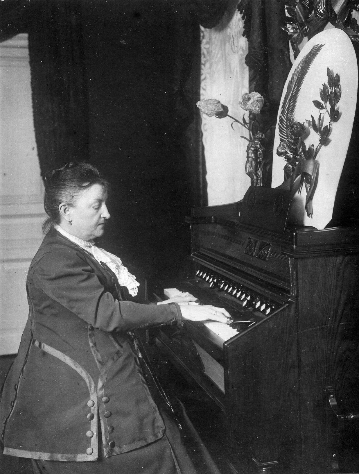 Есипова, Анна Николаевна. Профессор Петербургской консерватории А.Н.Есипова за роялем